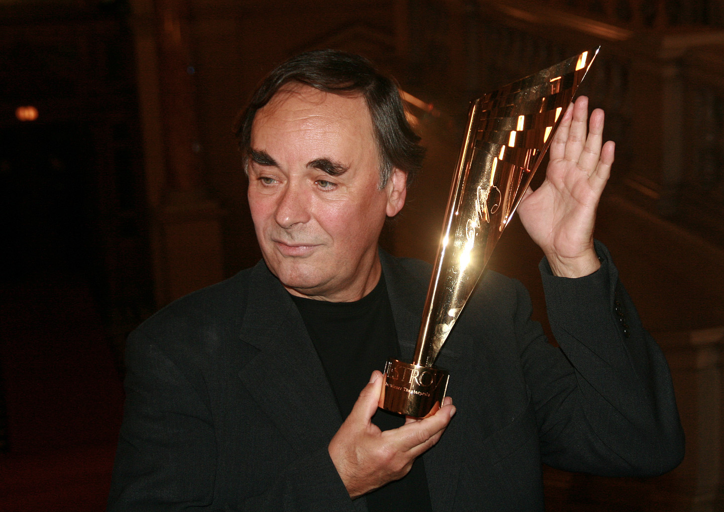 Johann Adam Oest, ausgezeichnet als bester Nebendarsteller, bei der Verleihung des Nestroy-Theaterpreises 2010 im Burgtheater in Wien.